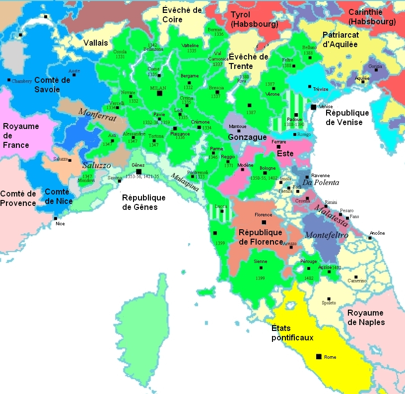 Carte de l'Italie du Nord en 1402